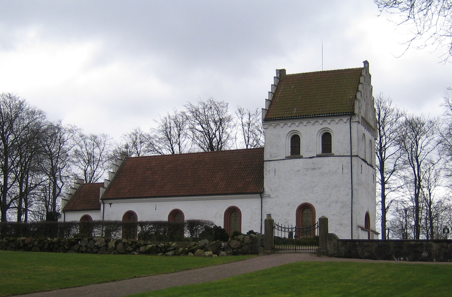 Högestads kyrka in Skåne, Sweden